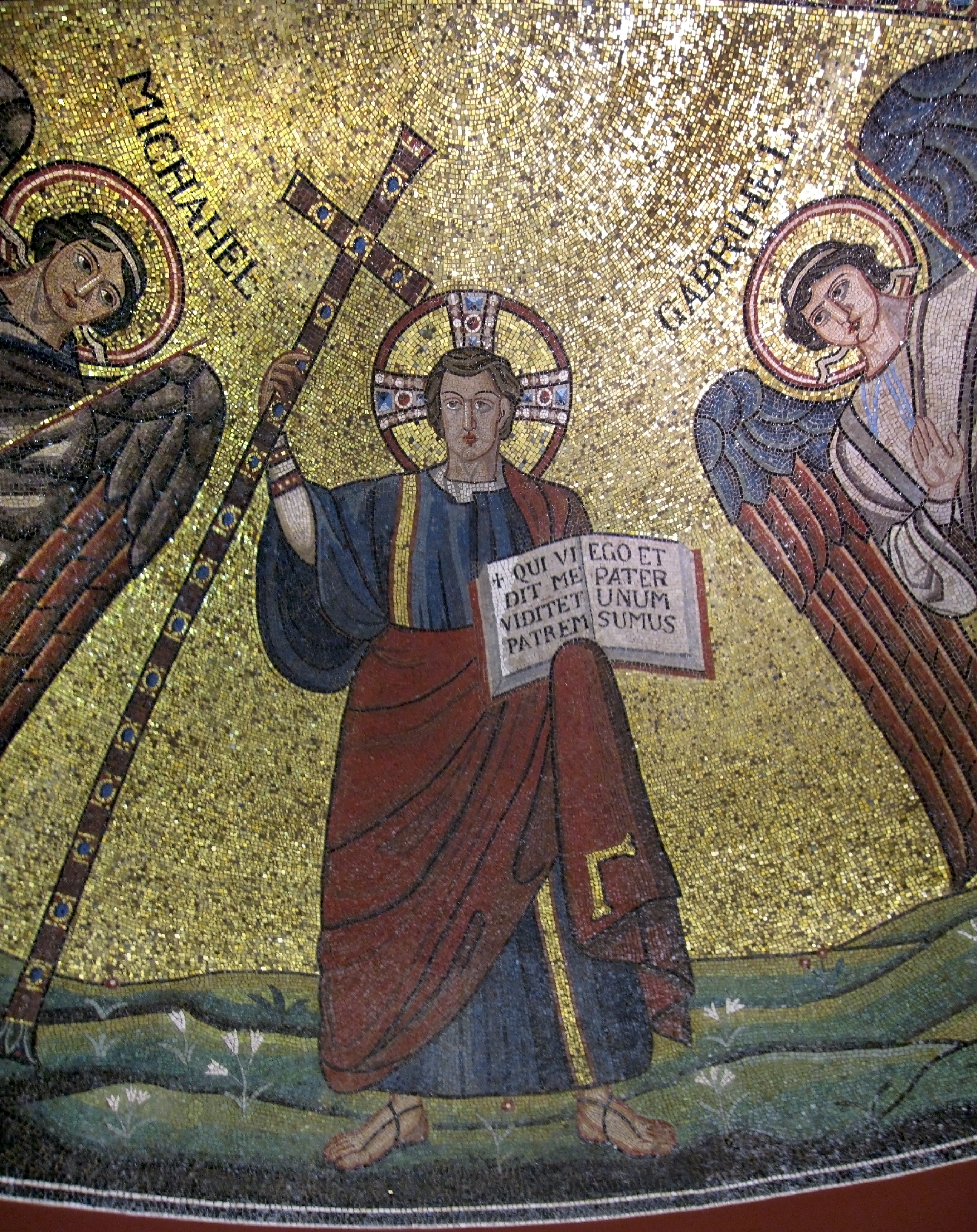 Apsismosaik. Ravenna, 545. Tesserae aus farbigen Smalten und Stein. Apsis: Christus Victor mit Erzengeln Michael und Gabriel. Stirnwand: Thronender Christus, Erzengel und posaunende Engel. Erworben 1903 Museum für Byzantinische Kunst, Inv. 6642.